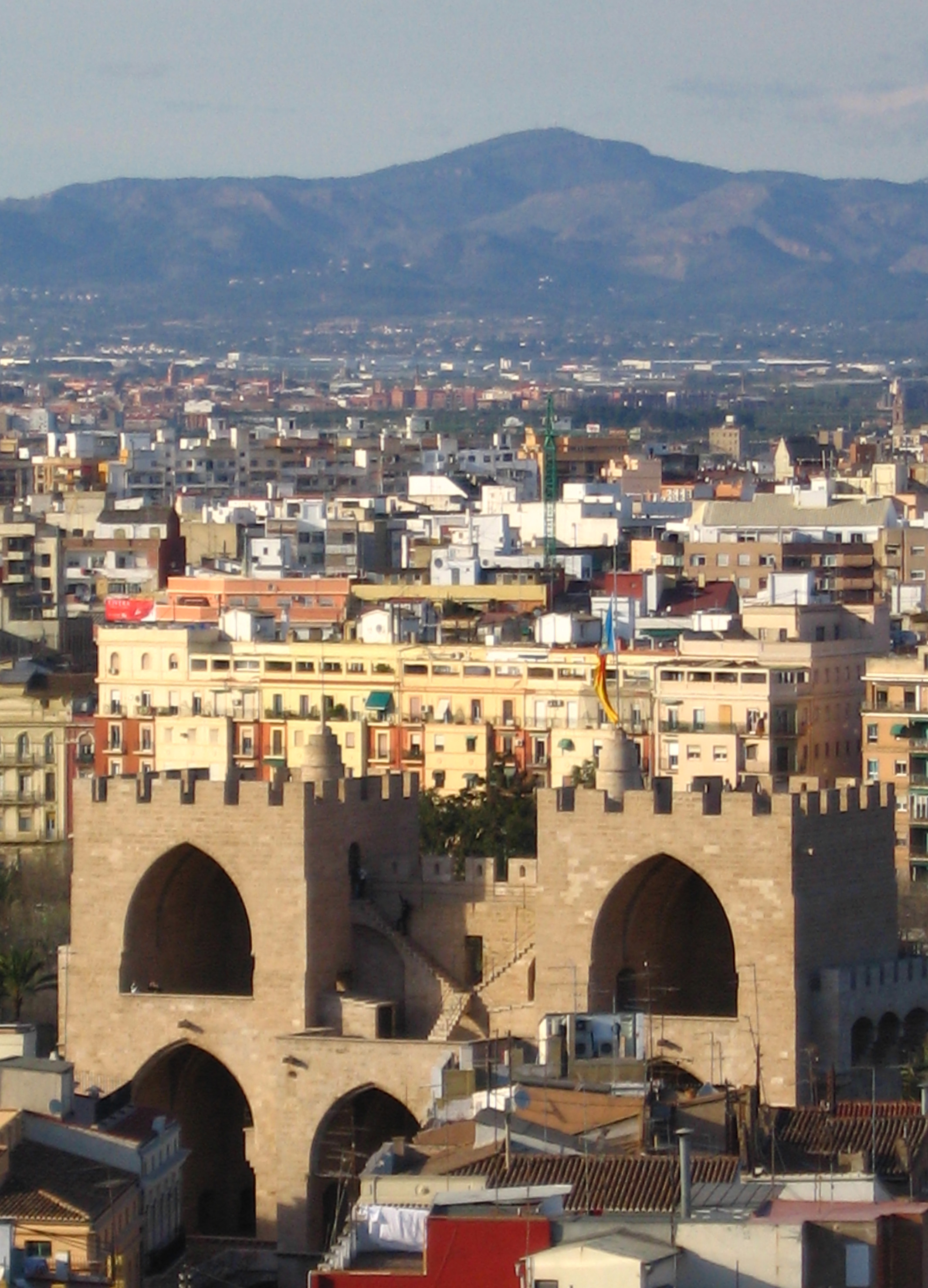 Torres de Serrans (València) i Serra Calderona